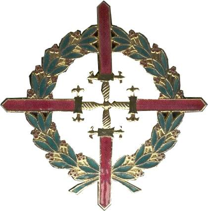 Crus Laureada de San Fernando